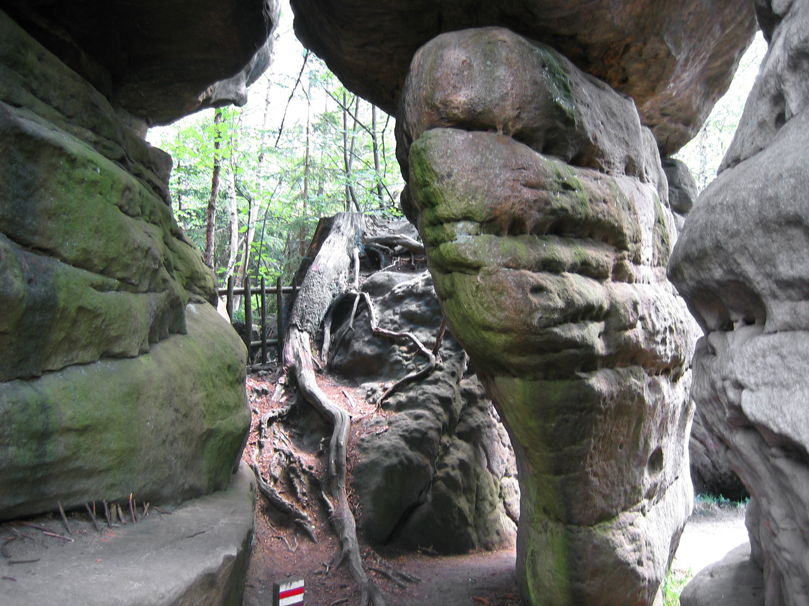 Błędne Skały, "Okręt", Góry Stołowe